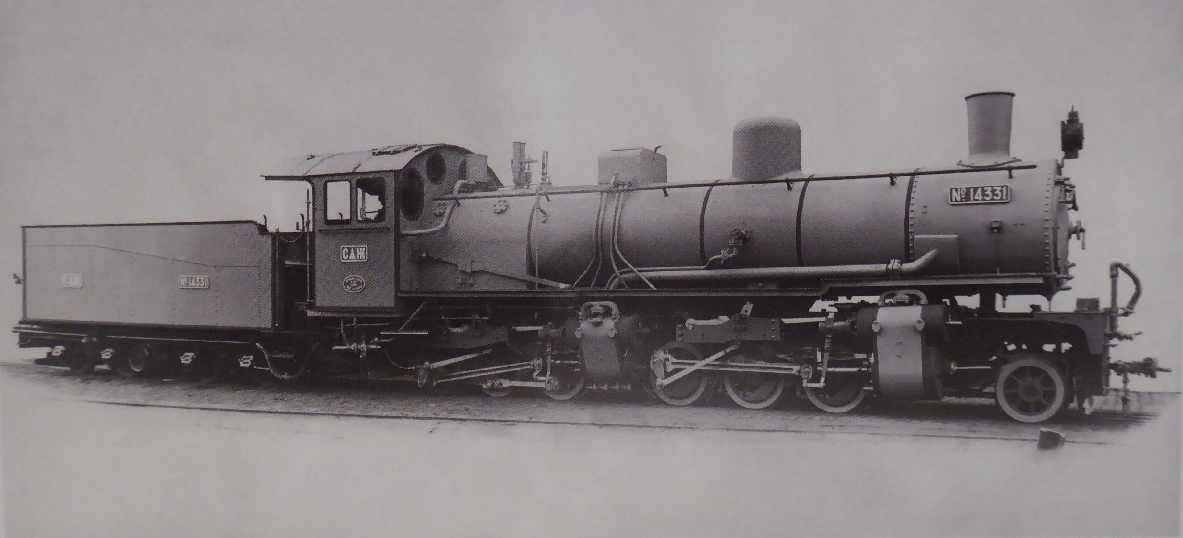 Die Lokomotiven der Baureihe SHS VIc7 14320–14349 waren Heißdampf-Mallet-Schlepptenderlokomotiven mit der Achsfolge (1'C)'C in Bosnischer Spurweite, die 1922 von Henschel & Sohn als Reparationslieferung nach Serbien kamen. Die Eisenbahnen des Königreichs der Serben, Kroaten und Slowenen (SHS) bezeichneten die Heißdampf-Mallets als SHS VIc7, die Jugoslawischen Staatsbahnen (JDŽ) als JDŽ 92.